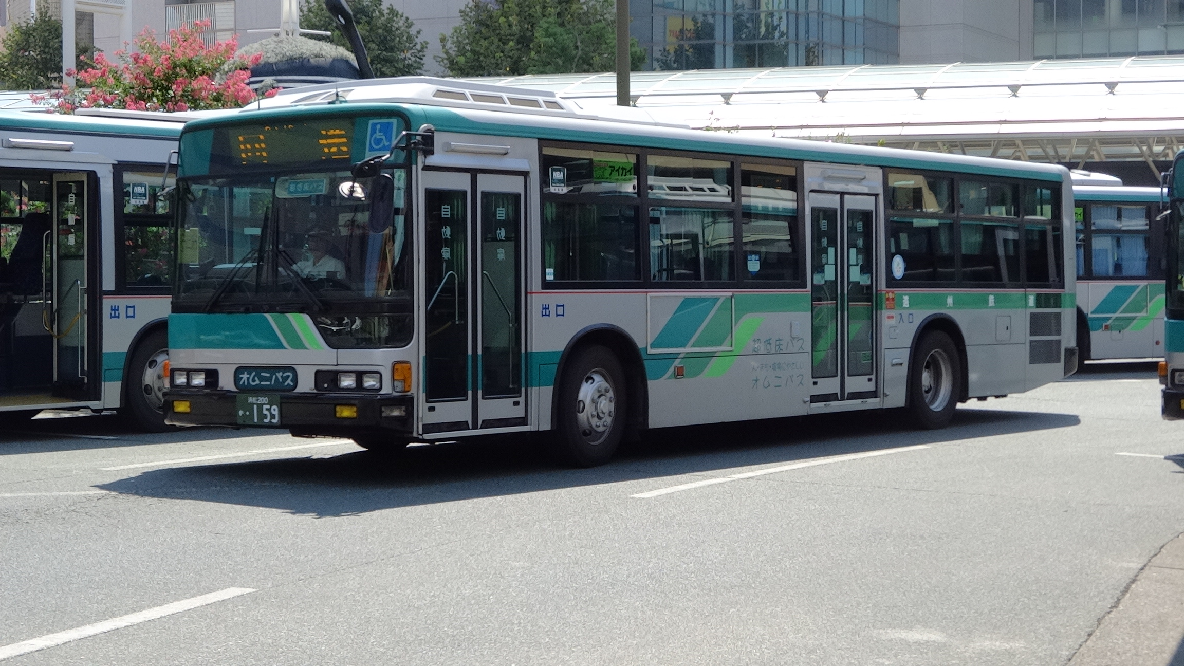 2001年に新製配置された,ノンステ車。外観からでは,KC-MP747Mと全くと言って言い程同じだが,KL-MP37JMである。 2013年8月27日(火)午後,浜松駅BTにて撮影。